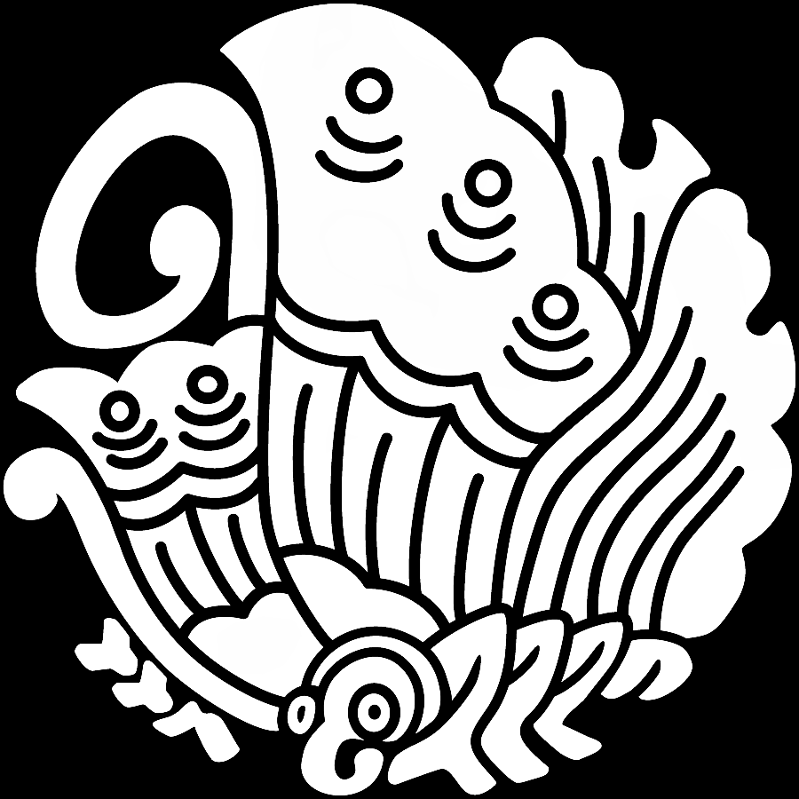 「播磨屋揚羽蝶」紋（染抜）